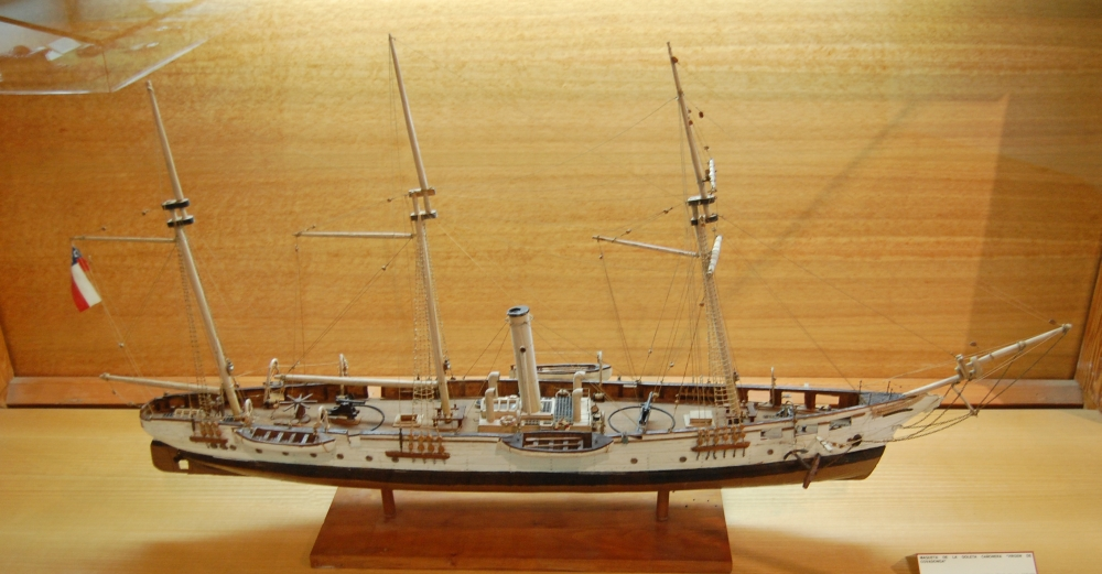 Fotografía de réplica a escala de la goleta Covadonga que se encuentra en el Museo Naval de valparaíso